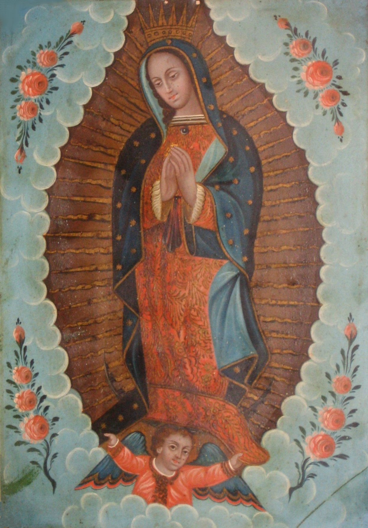 Mexican retablo